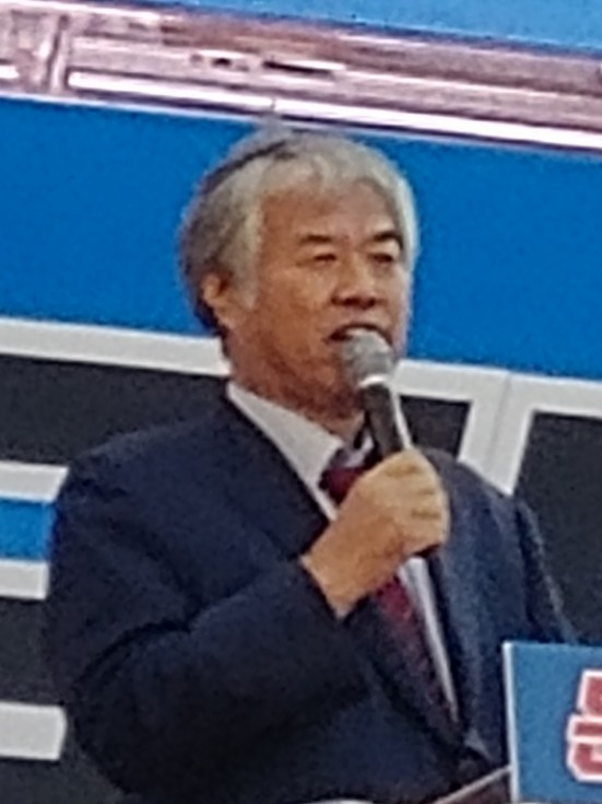 2019년 11월 9일, 광화문 광장에서 전광훈 목사가 연설을 하고 있는 장면이다.